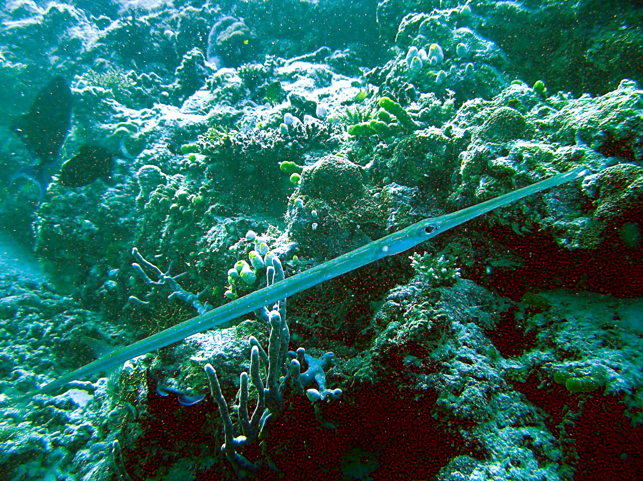 Flötenfisch (Fistularia commersonii) auf den Malediven, Veligandu. Kamera: Olympus C-765